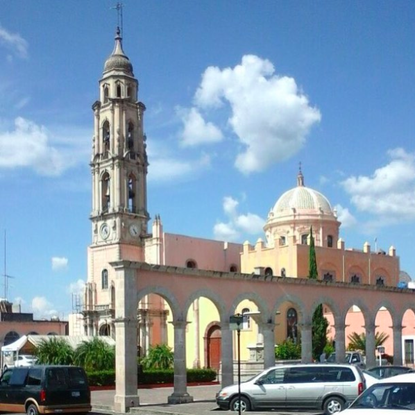 Vista de la Parroquia de San Miguel Arcángel remodelada en 2015